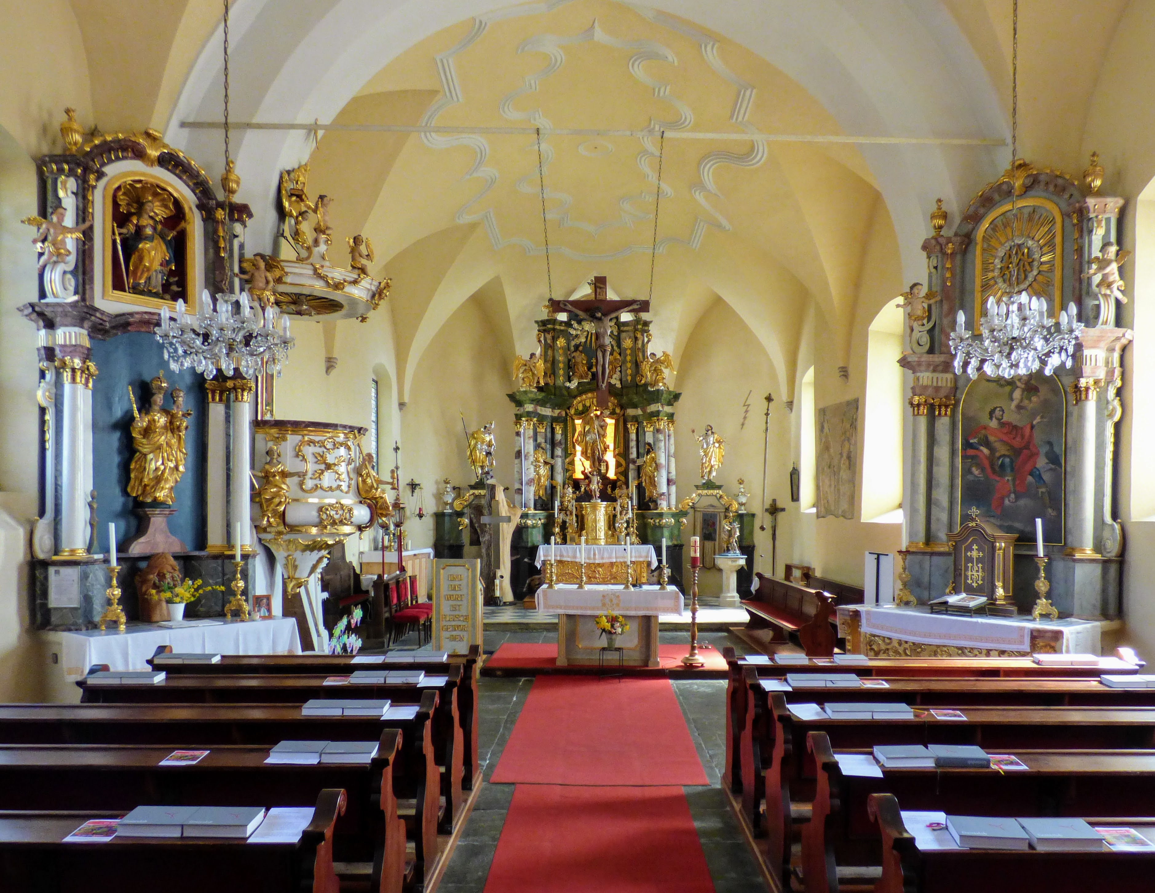 Pfarrkirche Obermühlbach, Gemeinde Frauenstein, Kärnten Kircheninneres: drei Altäre